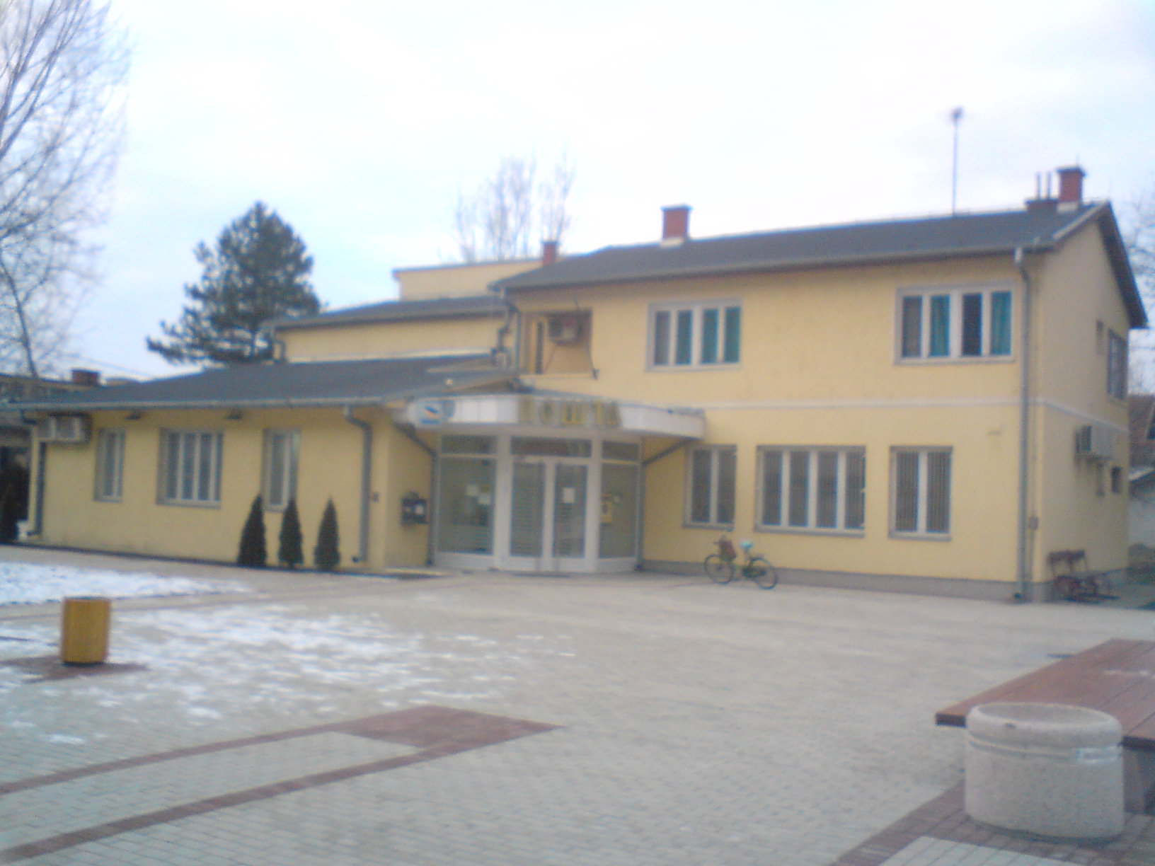 Пошта у Баточини